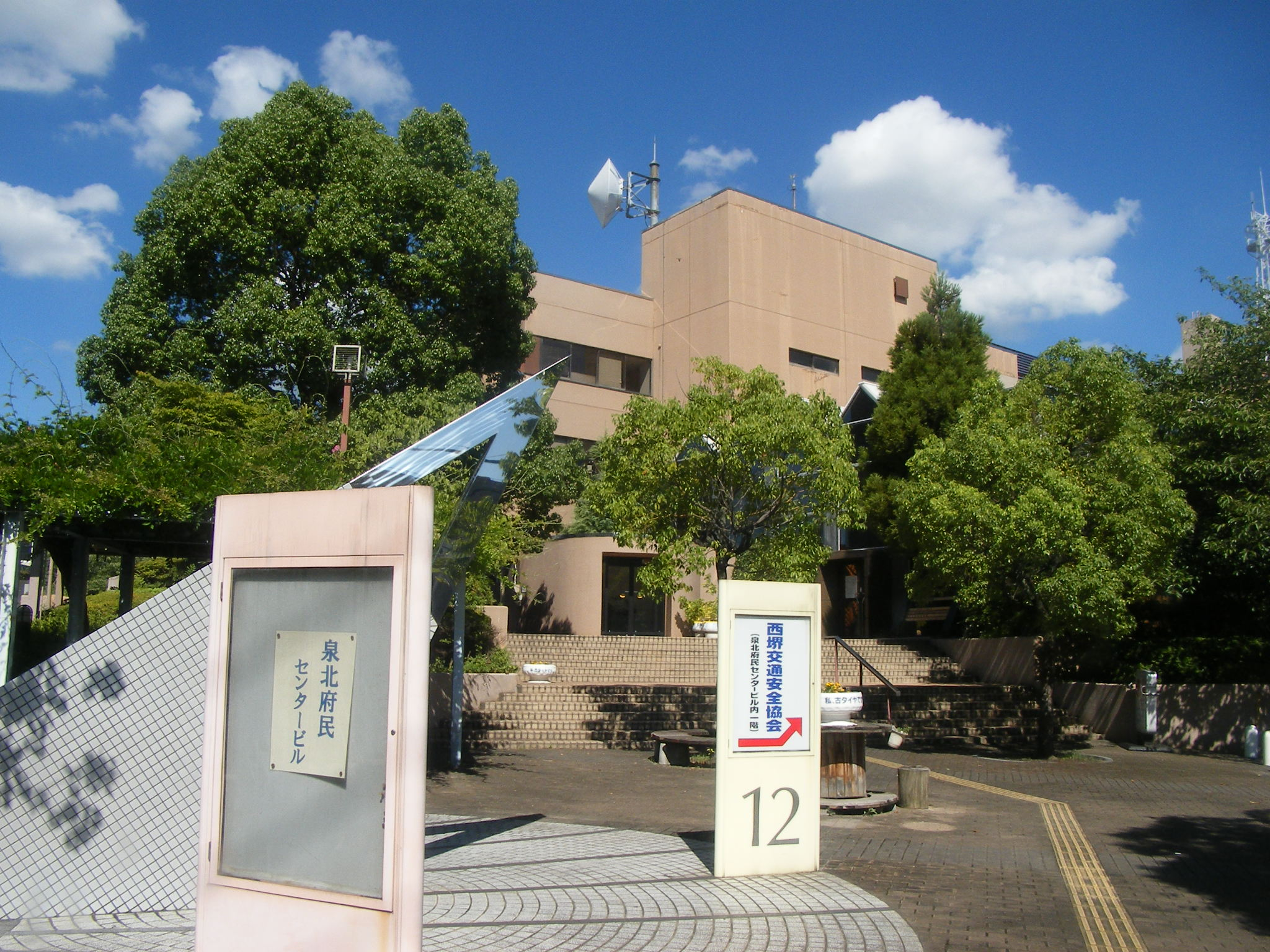 泉北府民センタービル外観写真 H22.8.6撮影